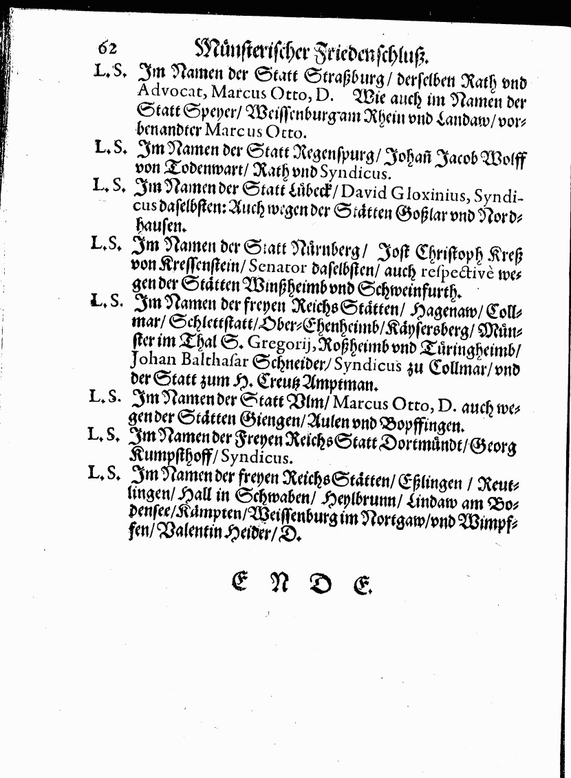 Scans des Drucks des Westfälischen Friedens, Vertrag von Münster